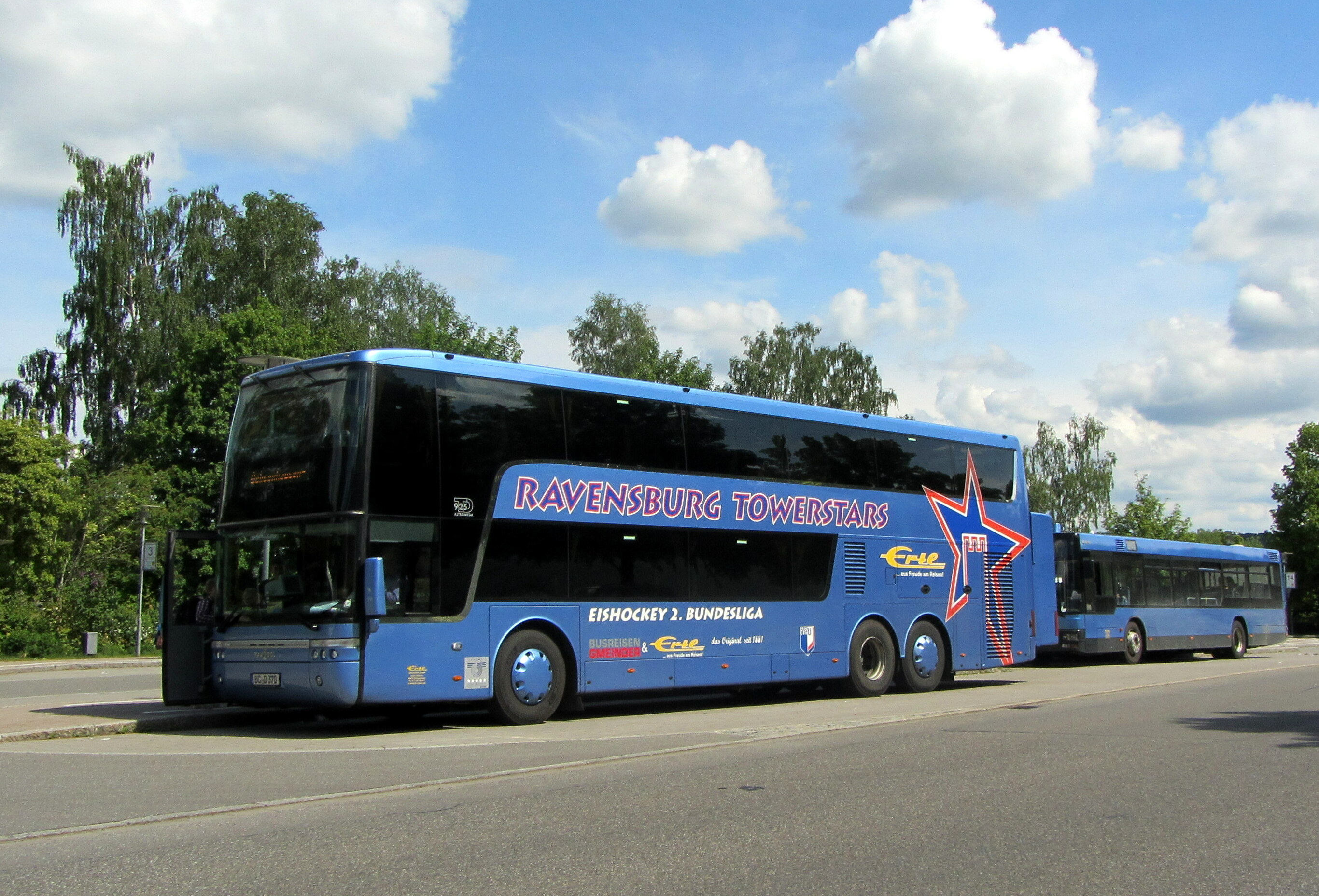 Busbahnhof Ochsenhausen